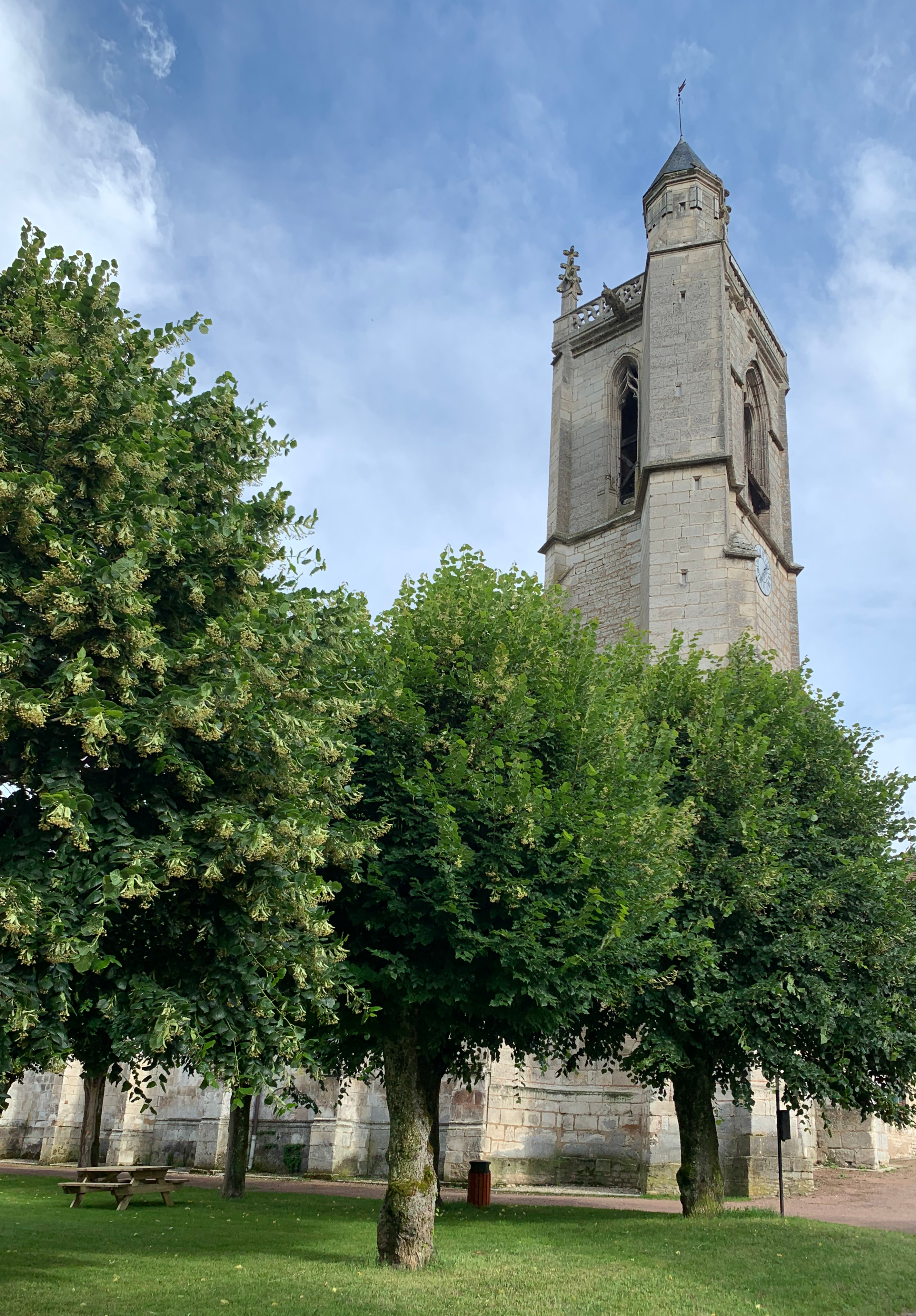 Église Saint-Germain d'Irancy en juin 2020.